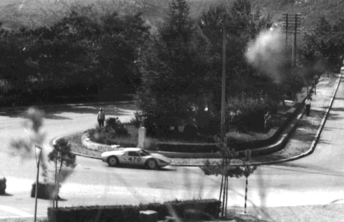 1965 Trieste-Opicina Gastone Zanarotti su Porsche 904